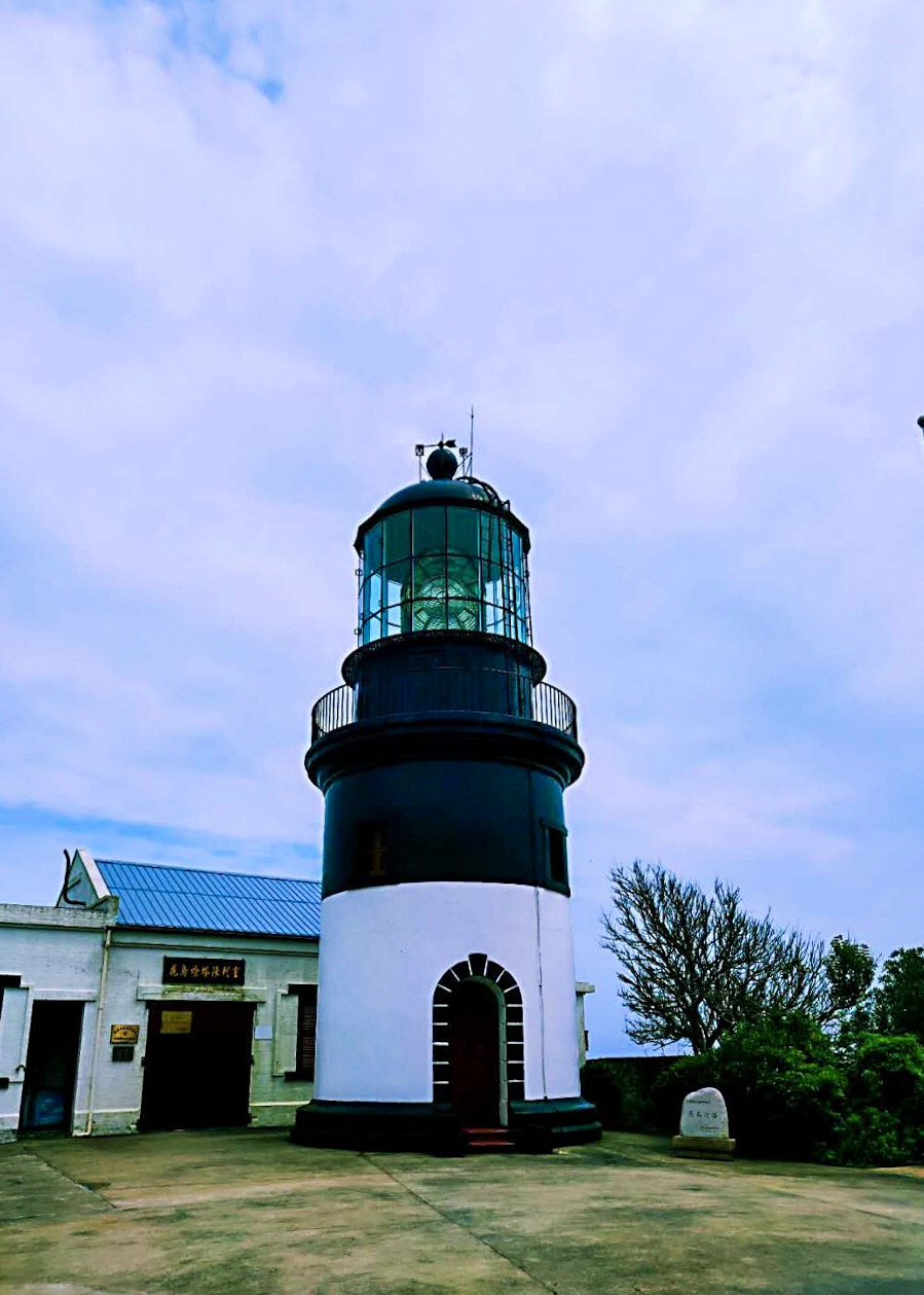 中文（中国大陆）: 花鸟灯塔 花鸟山